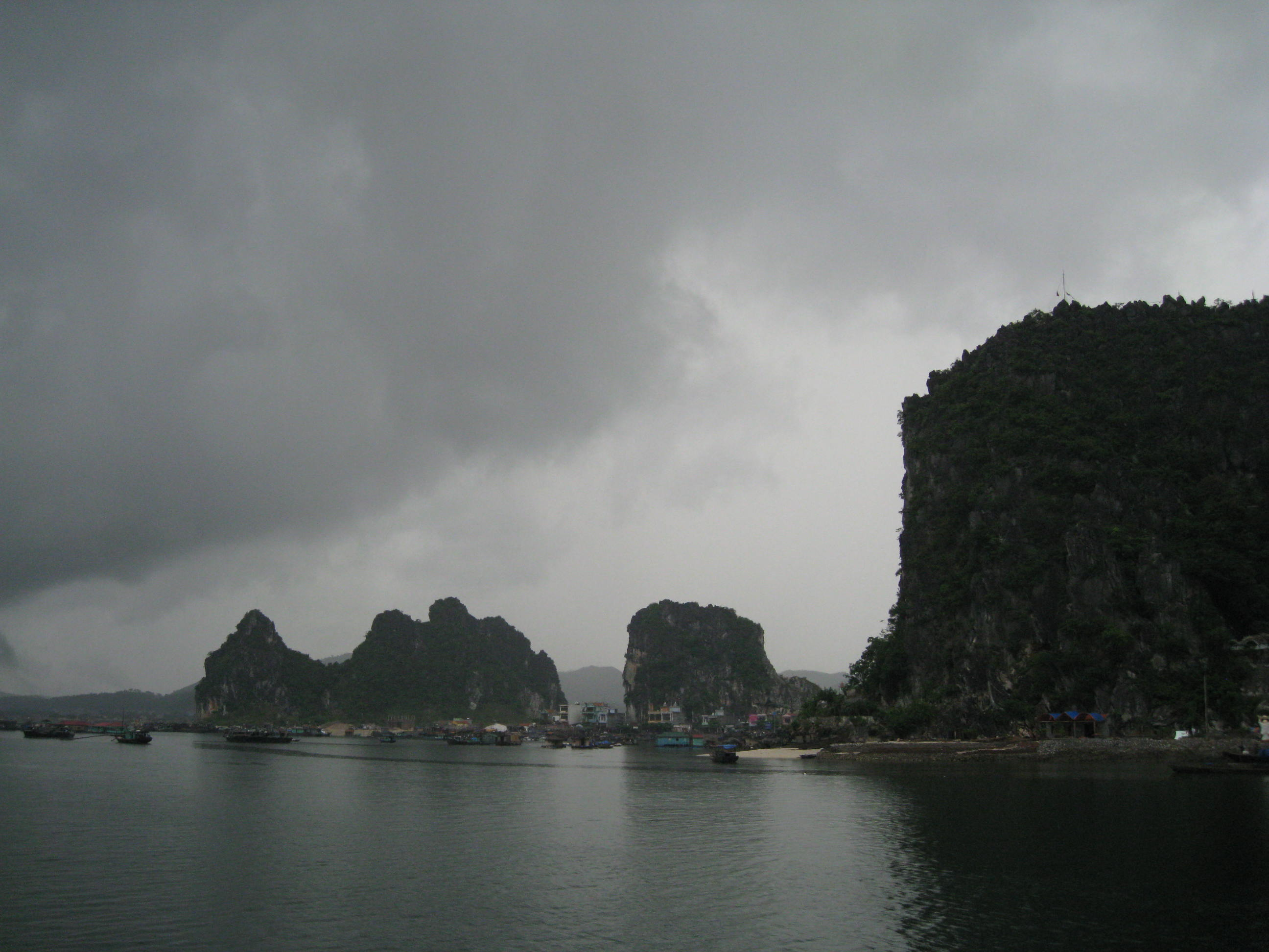 Hoạt động du lịch, đánh bắt nuôi trồng thủy sản và quần cư của con người trên vùng vịnh Bái Tử Long